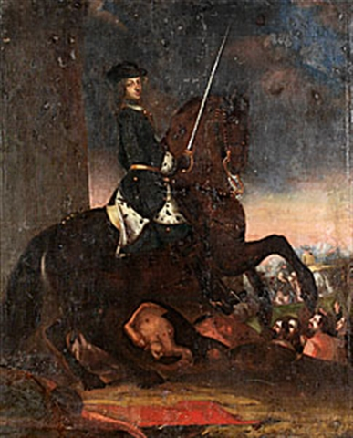 King Karl XII of Sweden. (King Karl XII on horse)